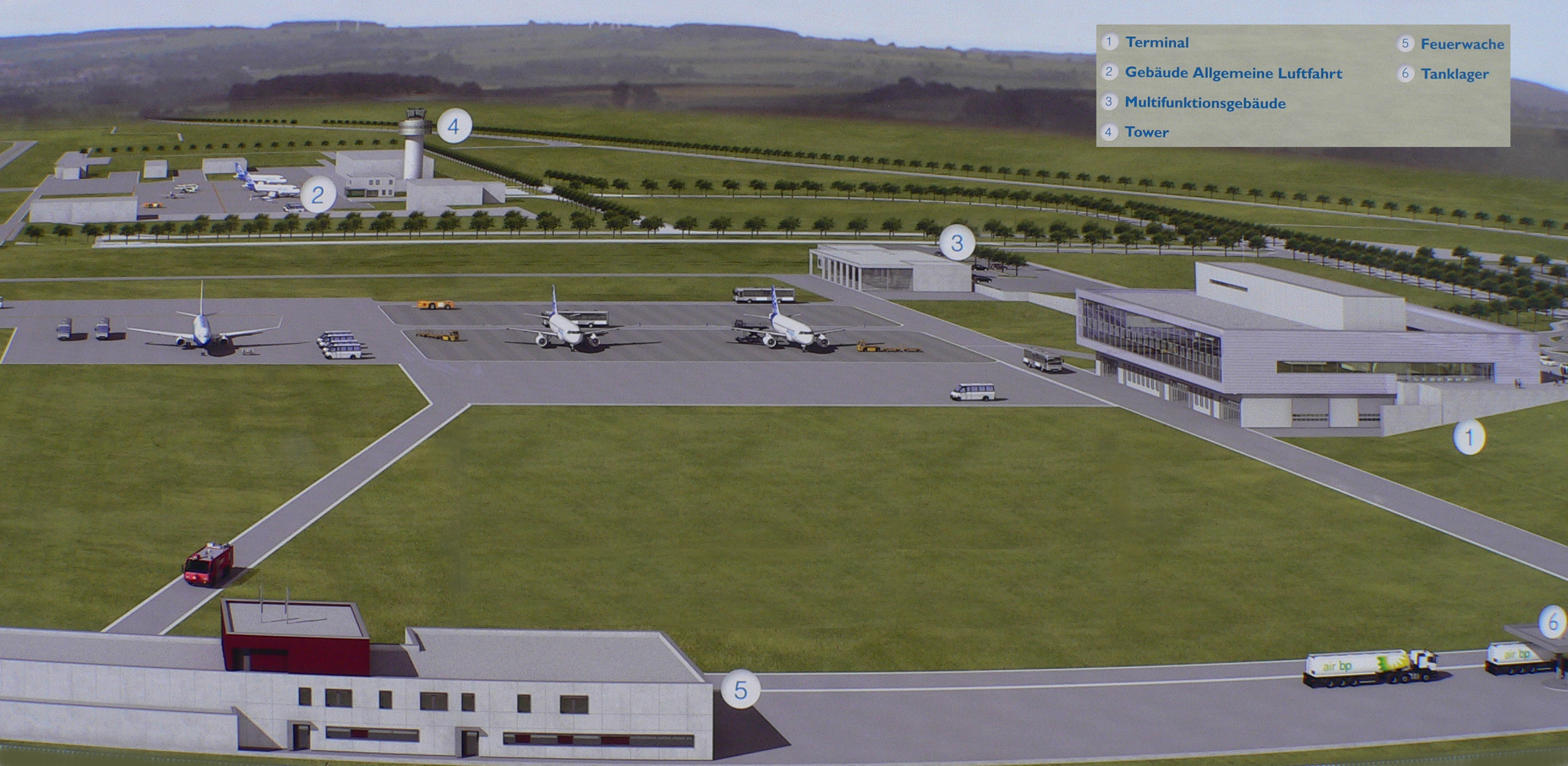 Flugplatz Kassel-Calden, Bauschild am Infopoint: Vorfeld-Modellplan des neuen Regionalflughafens.